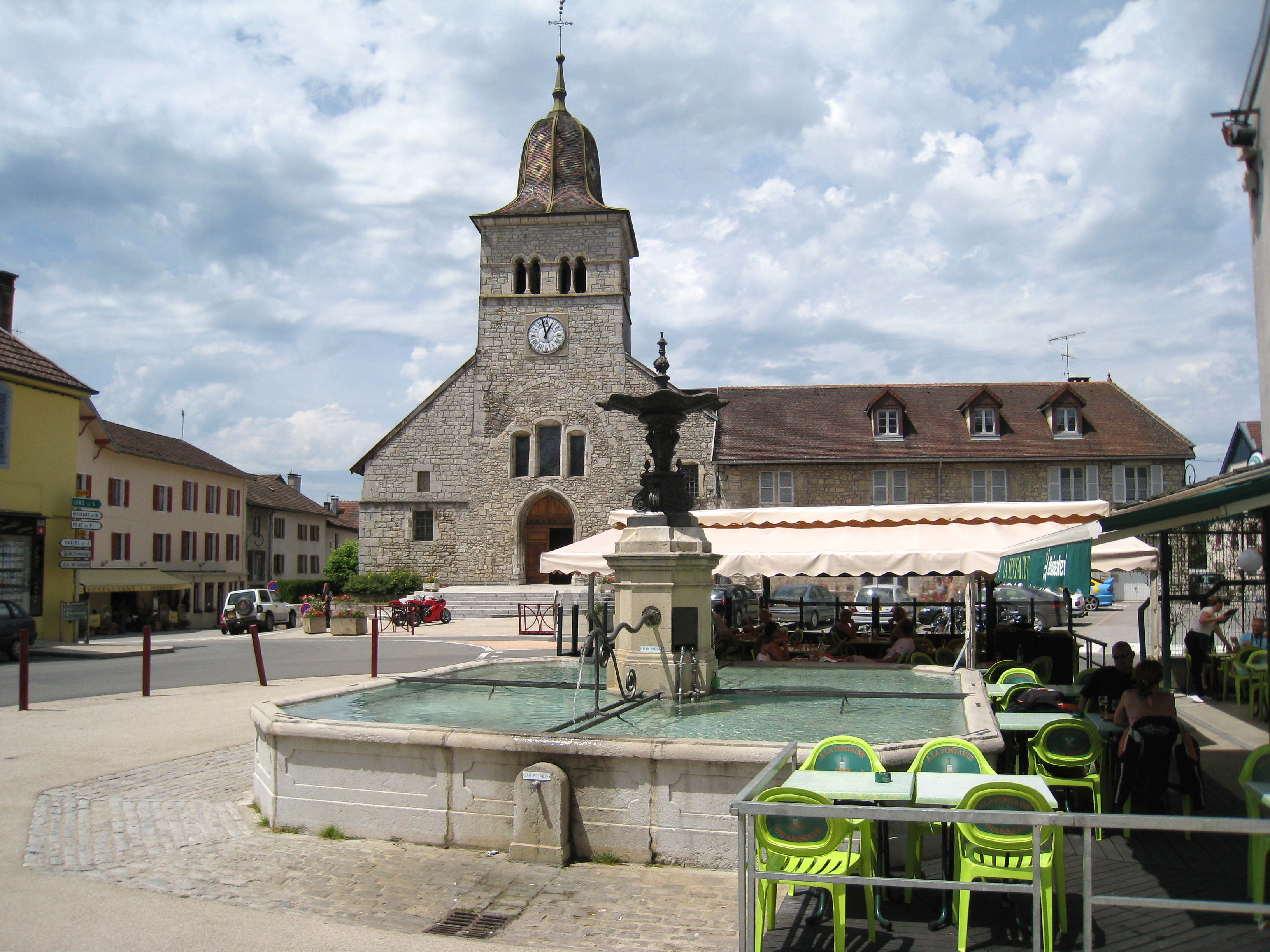 Fontaine et église de Clairvaux-les-Lacs (Jura, France).